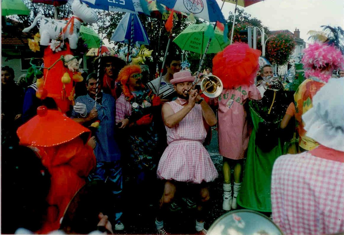 A la Fête des vendanges de Bagneux 2000 joyeux déchaînement avec les Joyeux Vignerons de Bagneux en tenue de bébés roses, les Fumantes de Pantruche et des Carnavaleux de Dunkerque venus spécialement se joindre à la fête en car depuis Dunkerque.